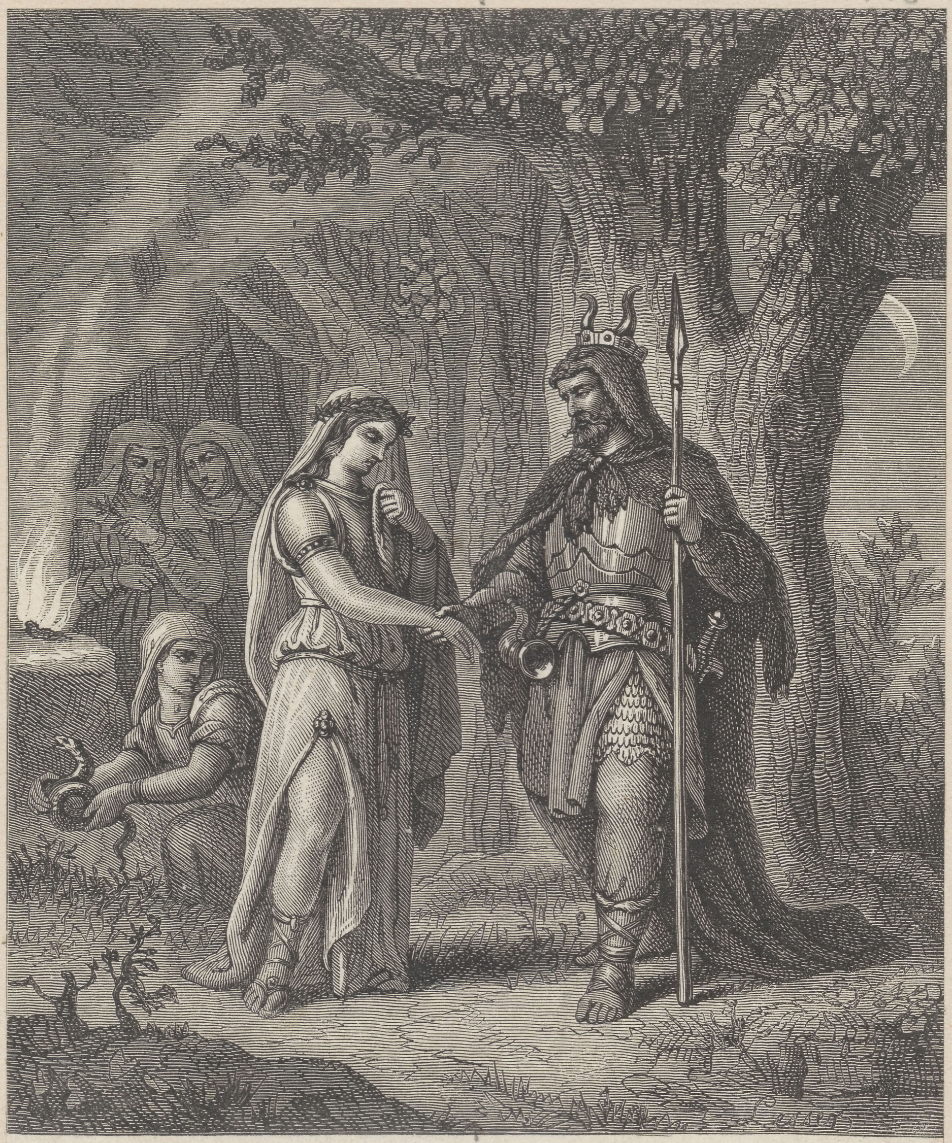 Беларуская (тарашкевіца): Партрэт Кейстута (Kiejstut) і Біруты (Biruta)